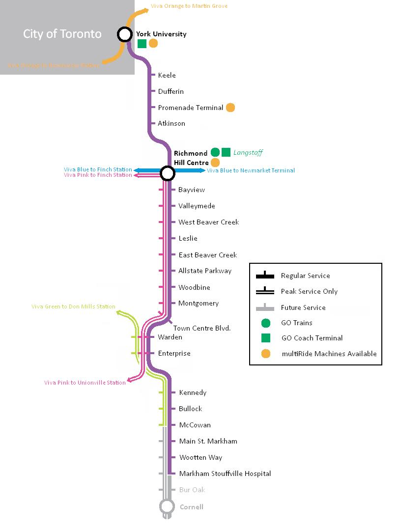 Viva Purple Line Map